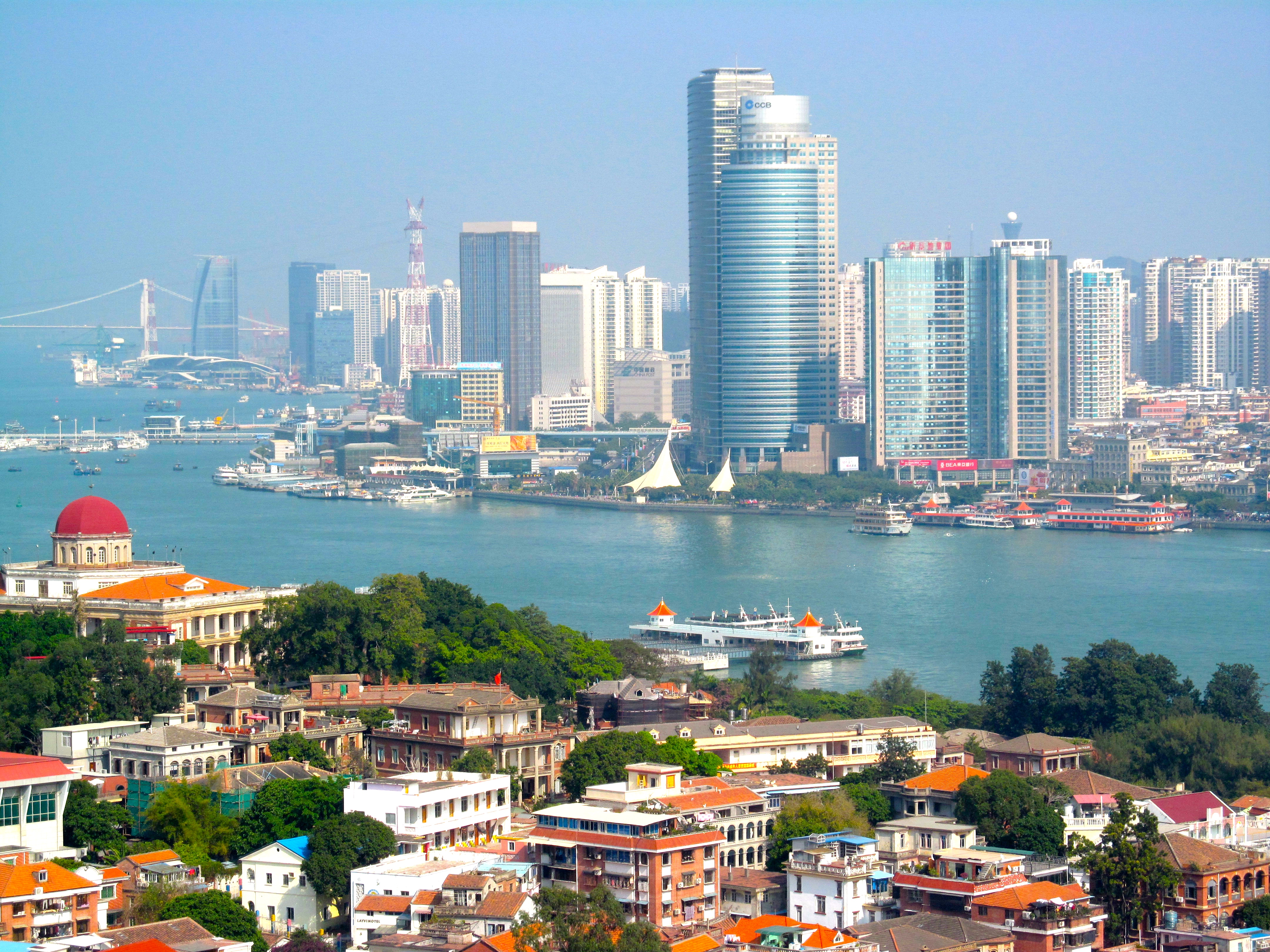 日光岩より望む廈門市内